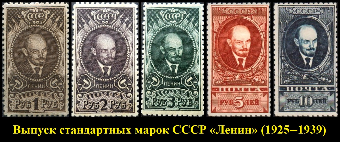 Стандарт «Ленин» (1925—1939)